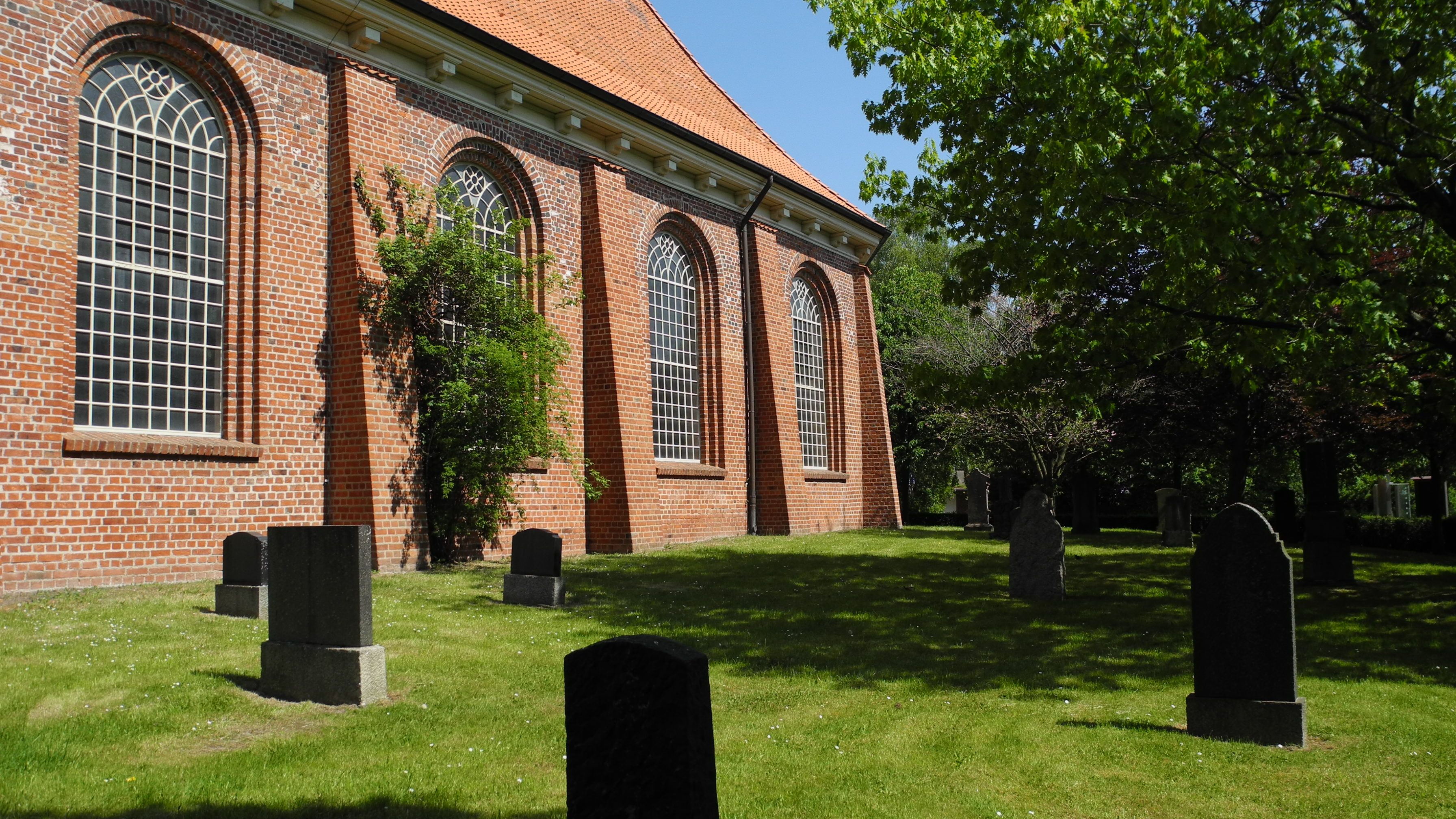 Jork - Friedhof der St.-Martini-Kirche Estebrügge